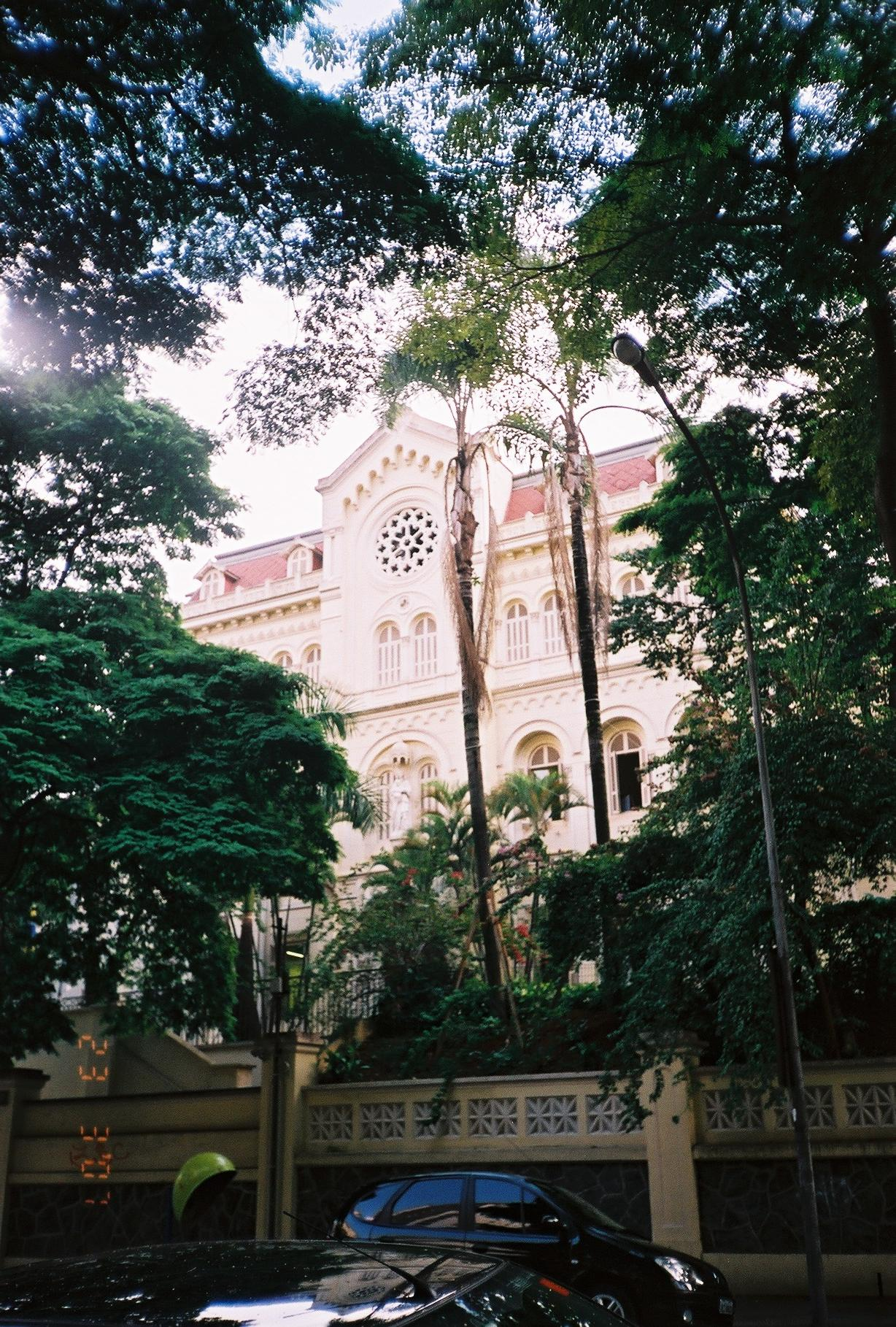 Colégio Nossa Senhora de Sion, na avenida Higienópolis, São Paulo, SP, Brasil.